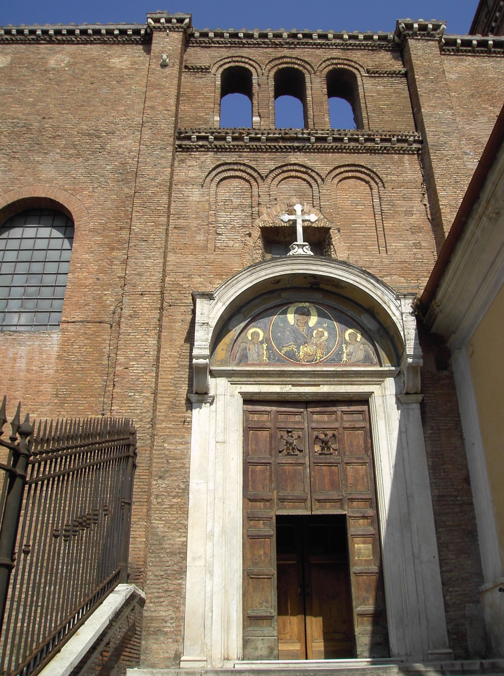 Roma, Basilica dell'Ara Coeli: ingresso antico verso il Campidoglio